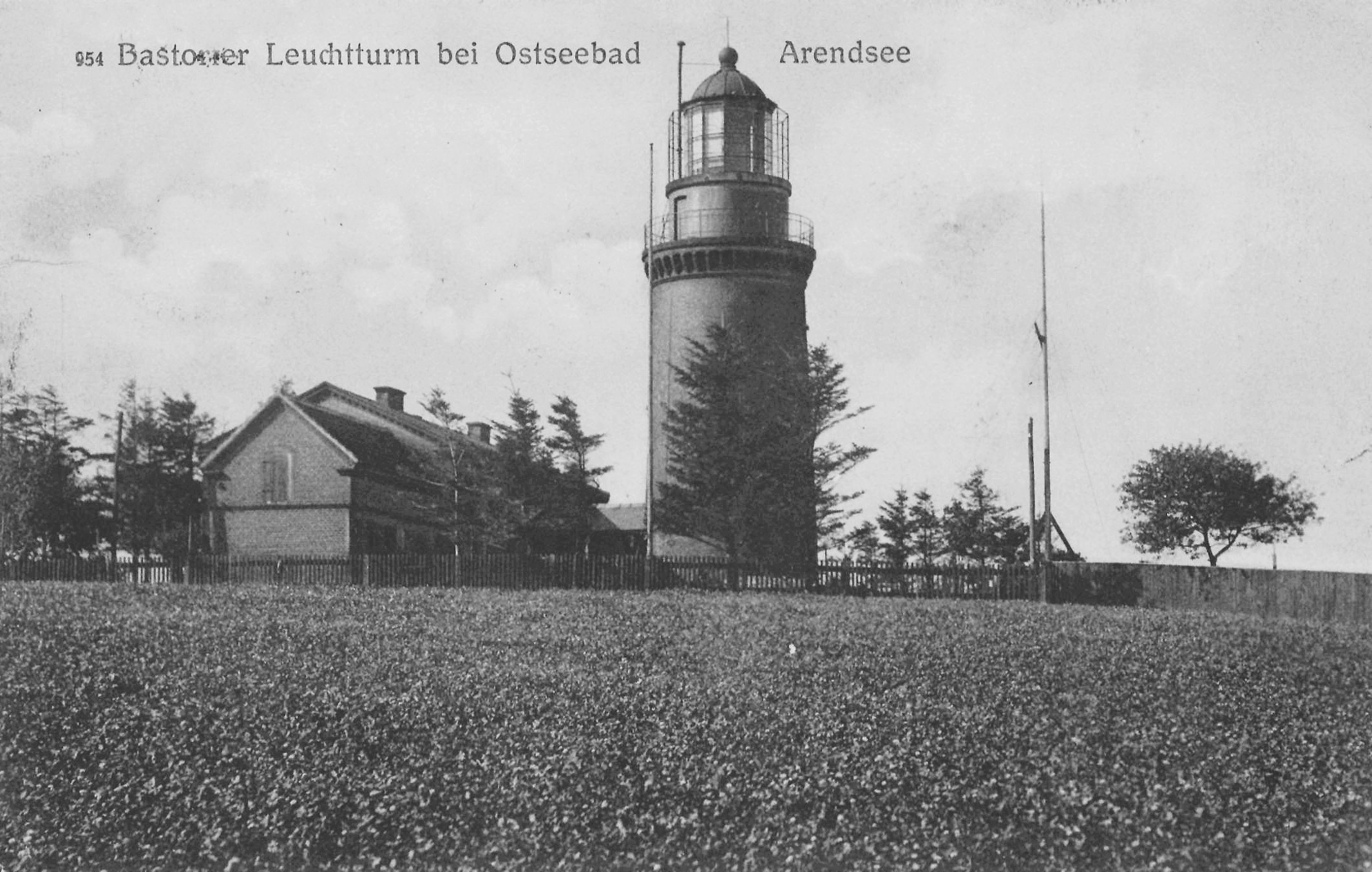 Arendsee, Ostseebad, Mecklenburg-Vorpommern - Bastorier Leuchtturm